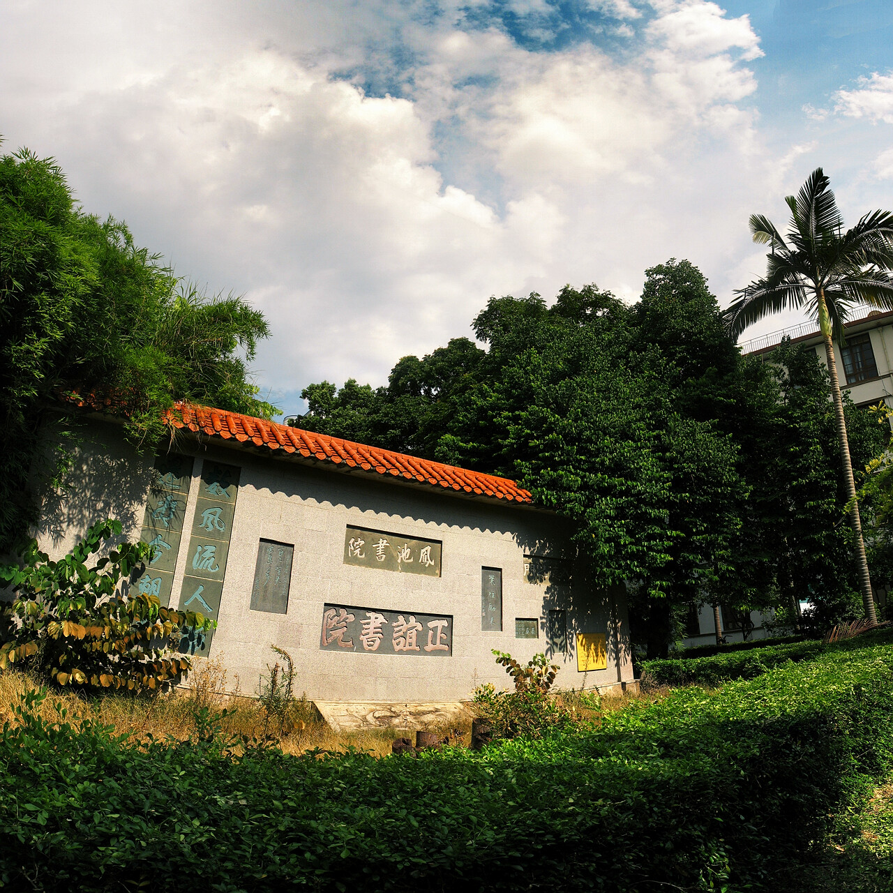 福州一中校园内的一面墙，有着正谊书院与凤池书院的题字。 文言: 福州第一中學有垣設焉。上所嵌題字，各屬正誼、鳳池二書院。